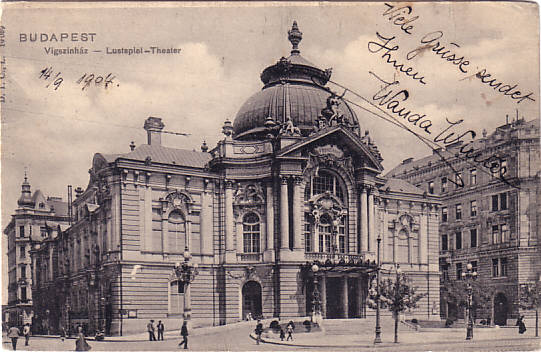 "Budapest - Vigszínház - Lustspiel-Theater"